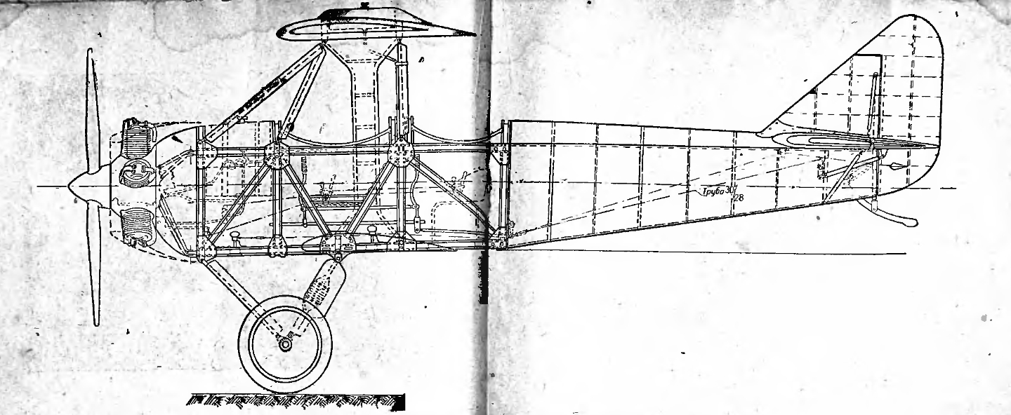 Vinogradov Idrago 3